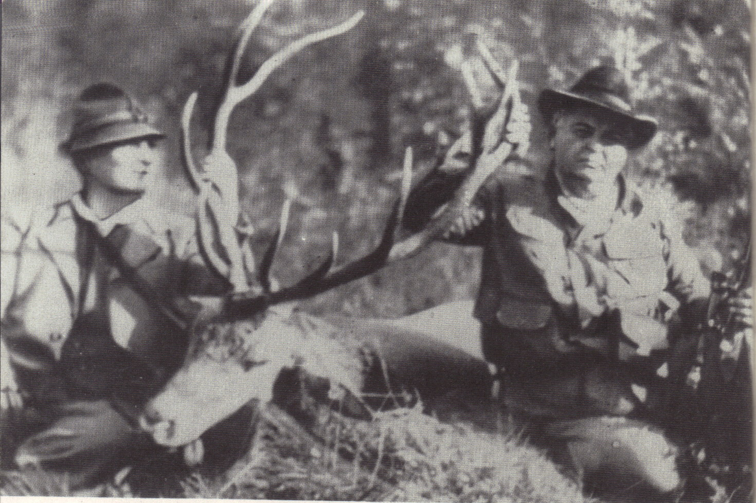 Ionel Pop și Mihail Sadoveanu la o vânătoare din 1937. Fotografie executată după un clișeu existent la Muzeul de literatură al Moldovei din Iași.